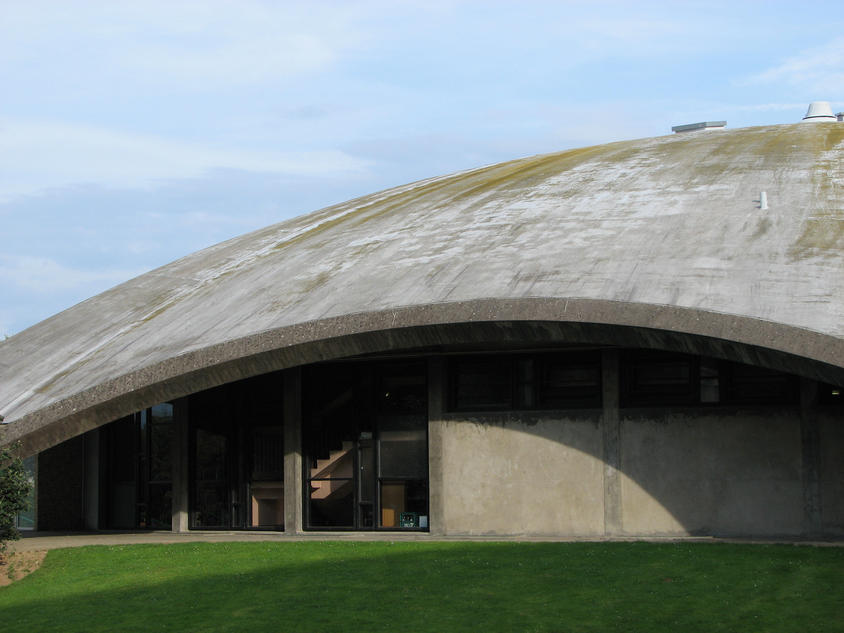 Centre culturel et de loisirs (CCL) de Riedisheim (Haut-Rhin)